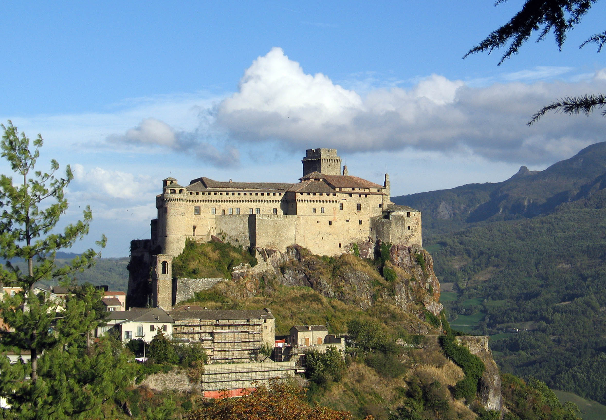 Bardi (Parma, Italia). Il castello dei Landi domina l'abitato del paese. Foto scattata da Carlo Ferrari.